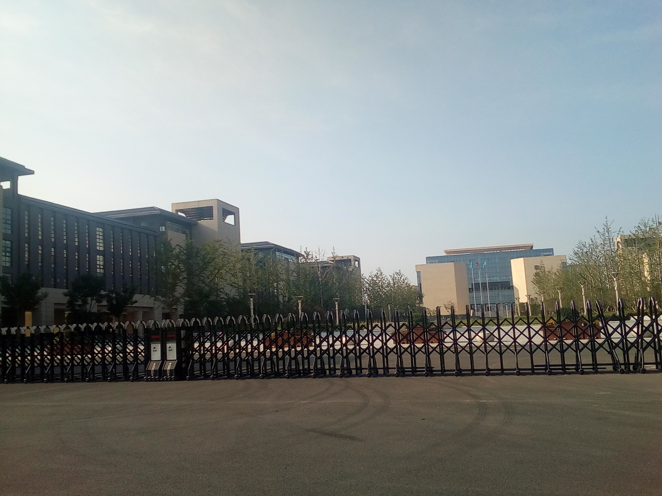 山东财经大学莱芜校区外景